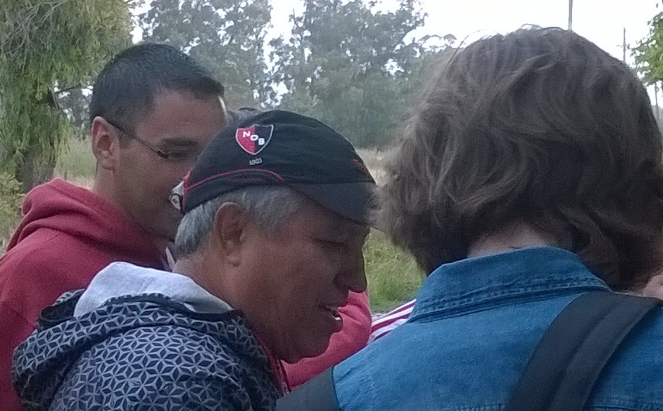 "El tolo" hablando con admiradores en Necochea durante la pretemporada de Newell's Old Boys